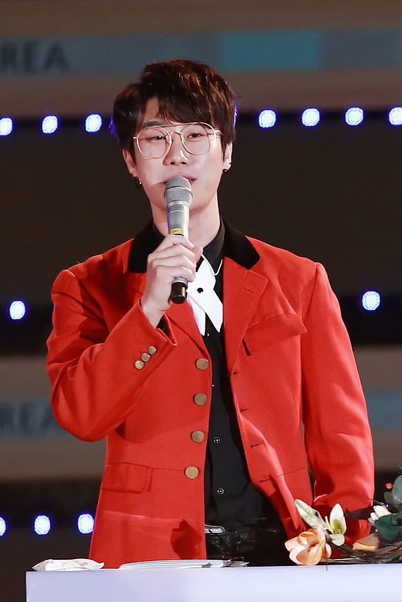 171014 우정슈퍼쇼